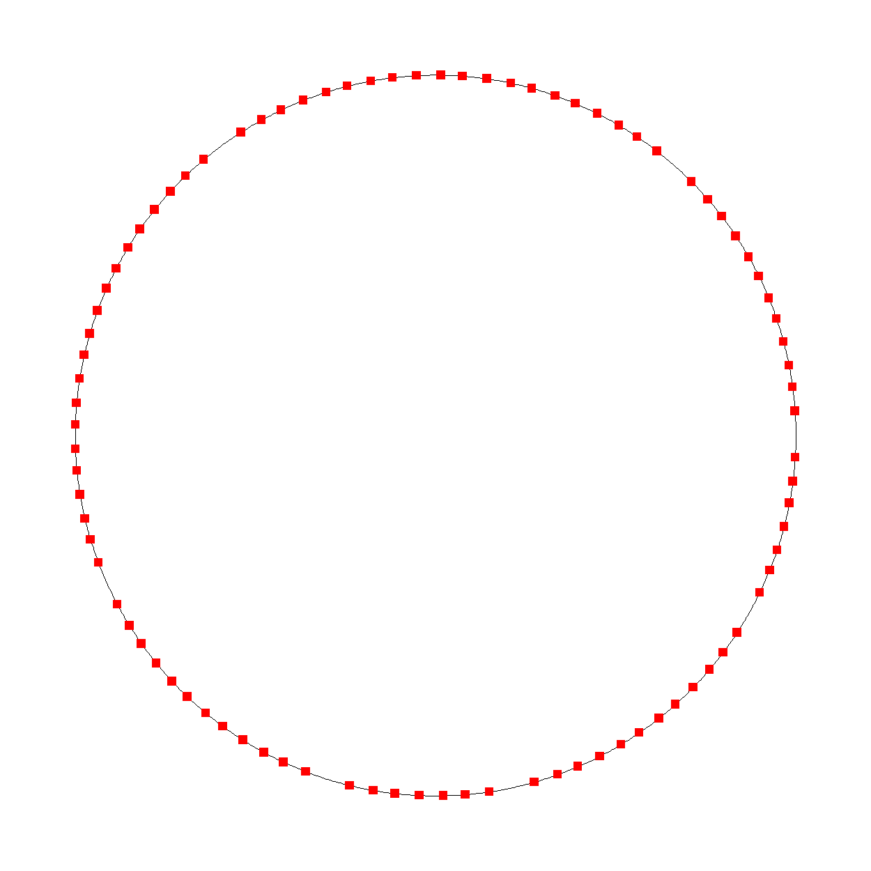 Првих 90 умножака ирационалног броја θ = 3 / 8 {\displaystyle \theta ={\sqrt {3 /8} модуло 1. Слику направио Dzordzm у програмском пакету Mathematica.